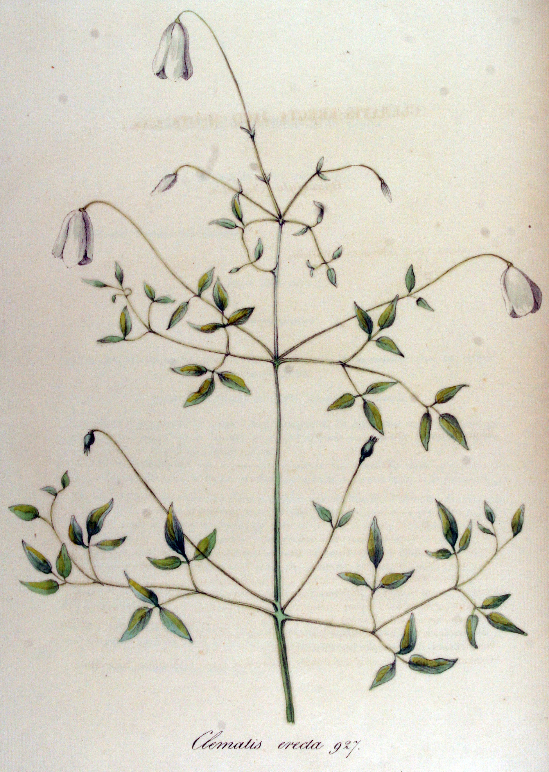 Clematis recta L. (Syn. Clematis erecta L.)